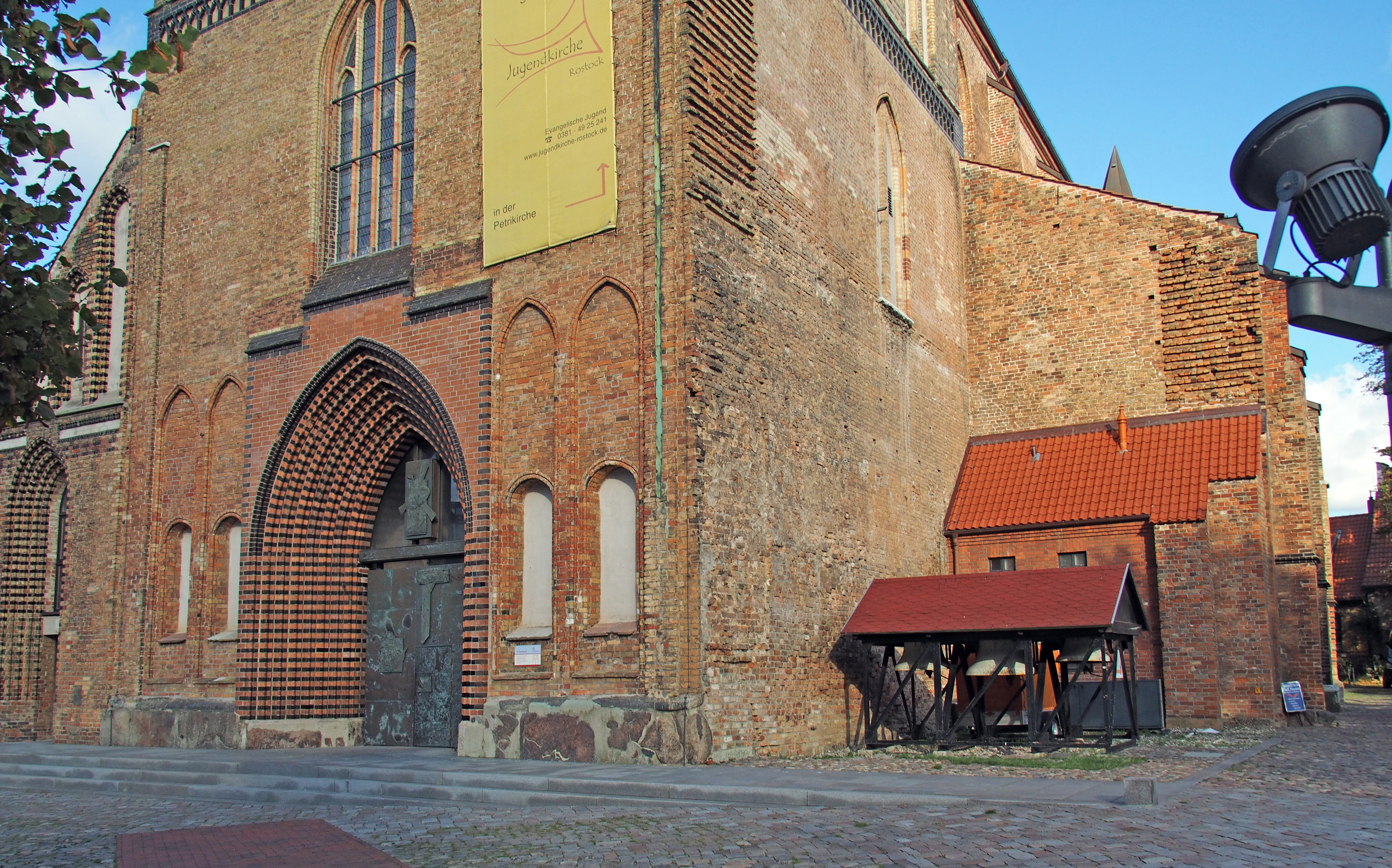 Eingang der Petrikirche Rostock mit separatem Glockenstuhl und drei provisorischen Stahlglocken